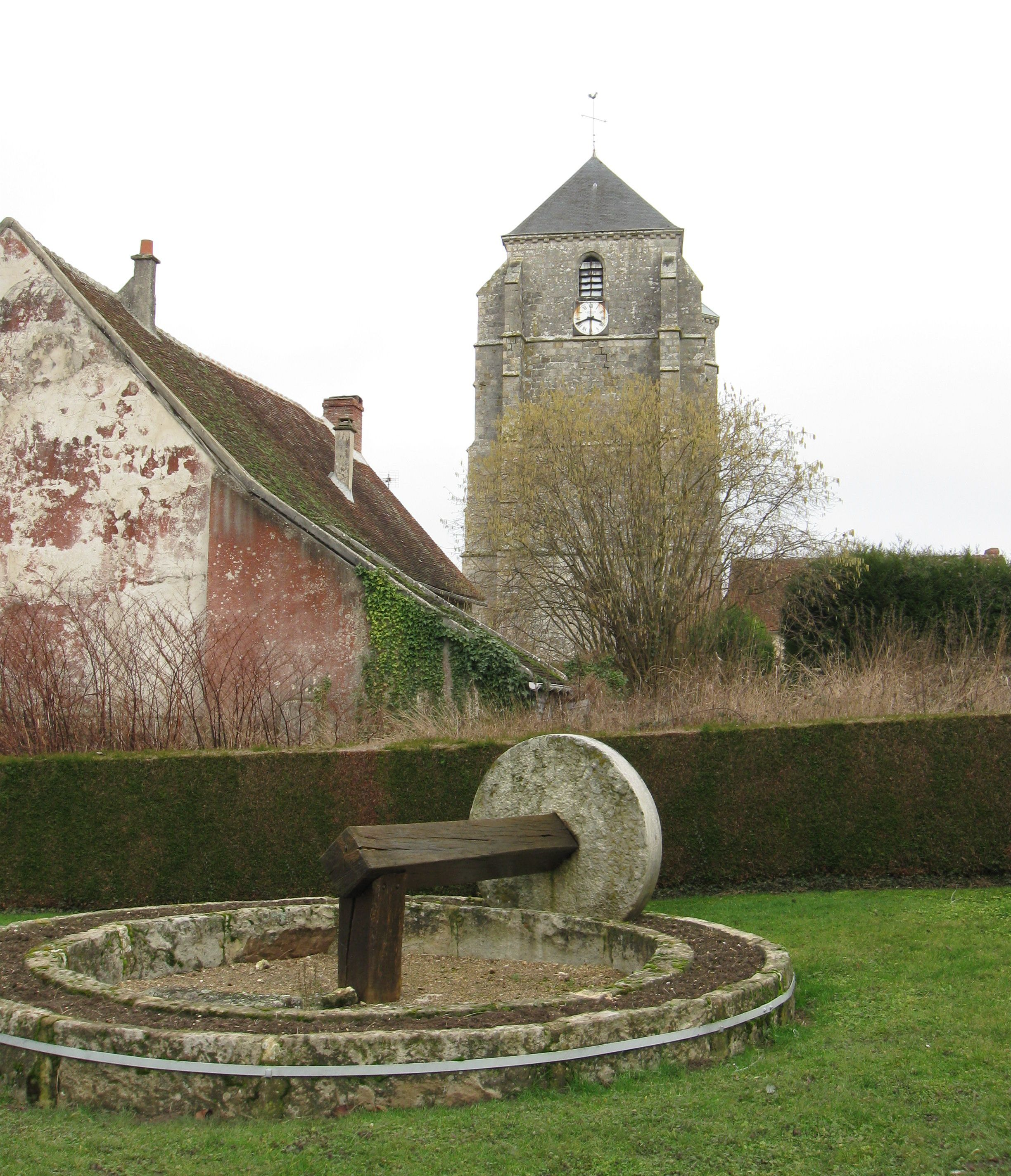 Ancien pressoir à roue. (la Chapelle-Moutilsdépartement de la Seine-et-Marne, région Île-de-France).